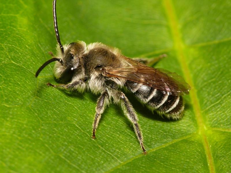 Andrena wilkella, male. Location: The Netherlands - Wageningen - Plasserwaard